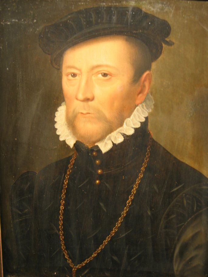 Portrait of François de Scépeaux